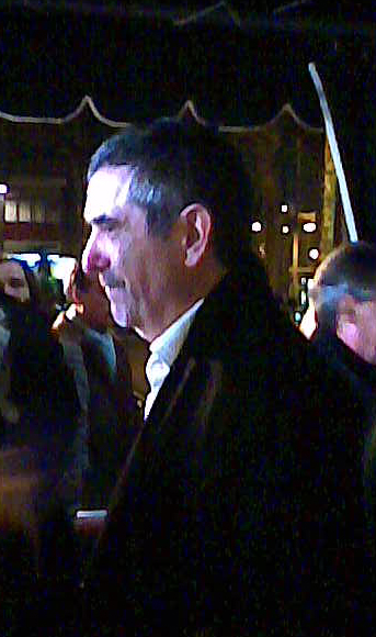 Joaquim Oristrell als III Premis Gaudí